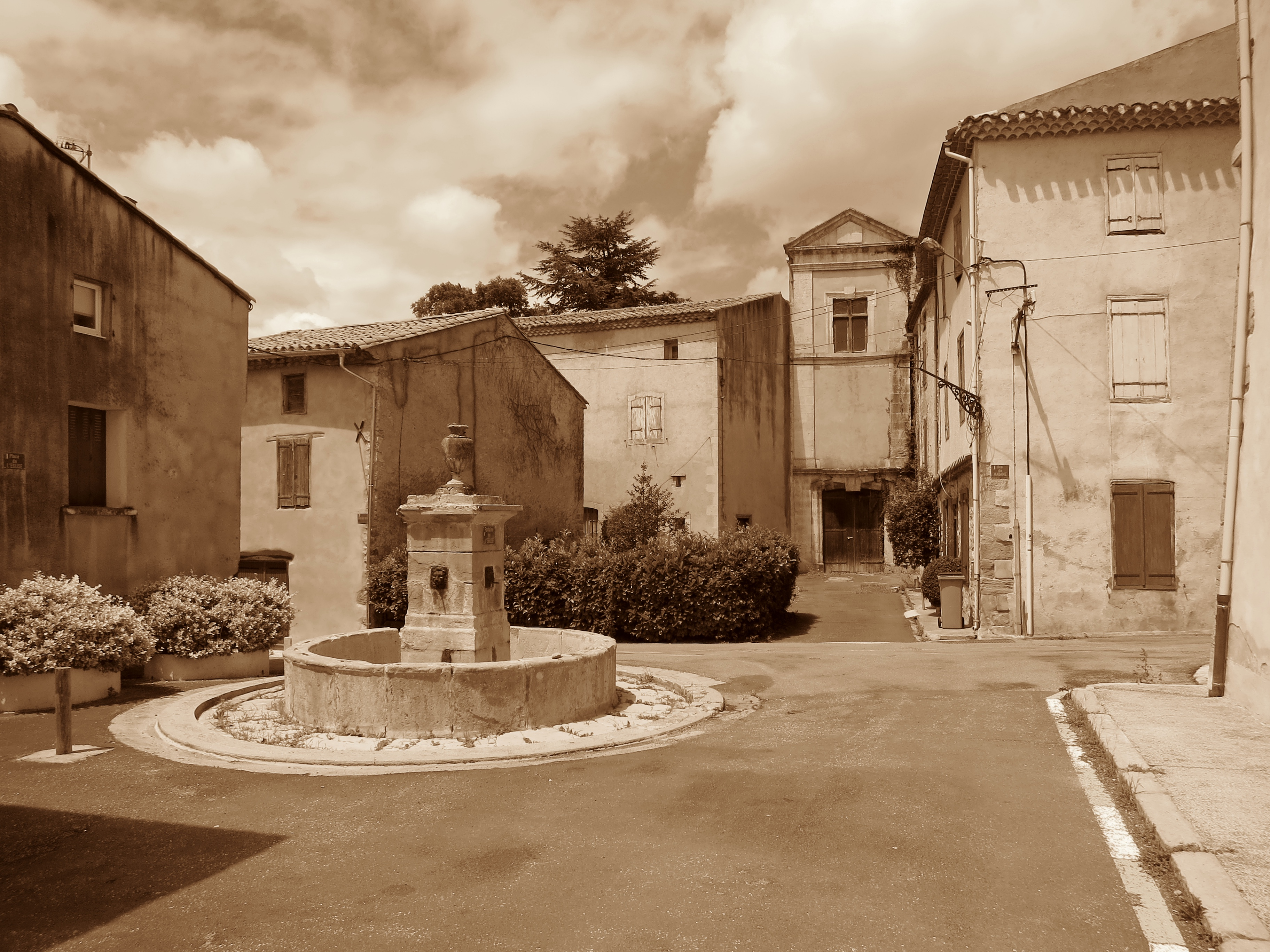 Nébias (Aude, France) - Place de l'Église avec la fontaine et le château.